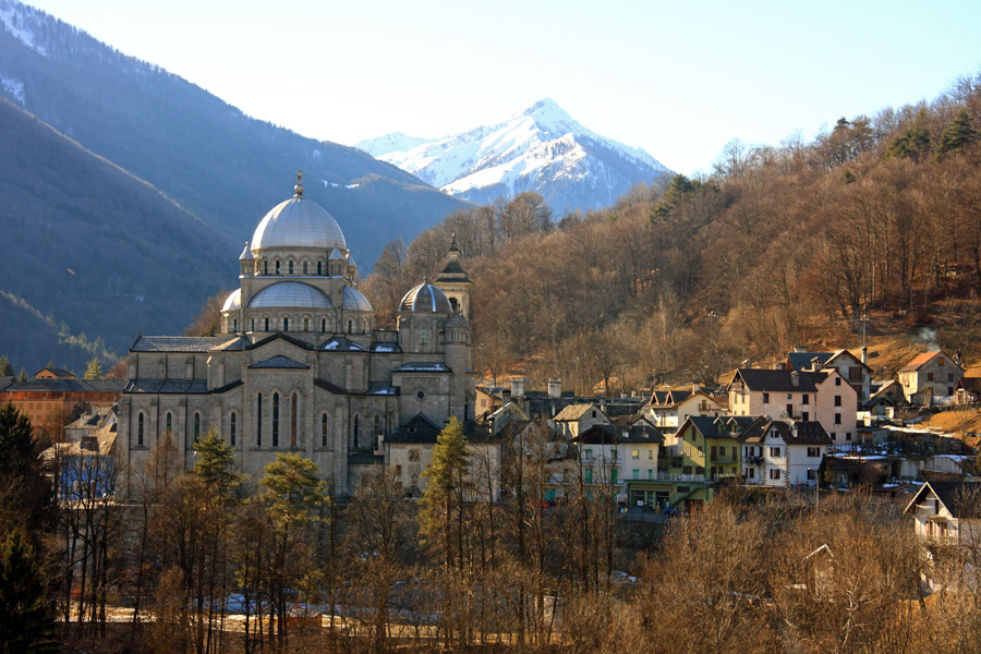 Panorama dell'abitato di Re (VB) visto dalla frazione Folsogno.